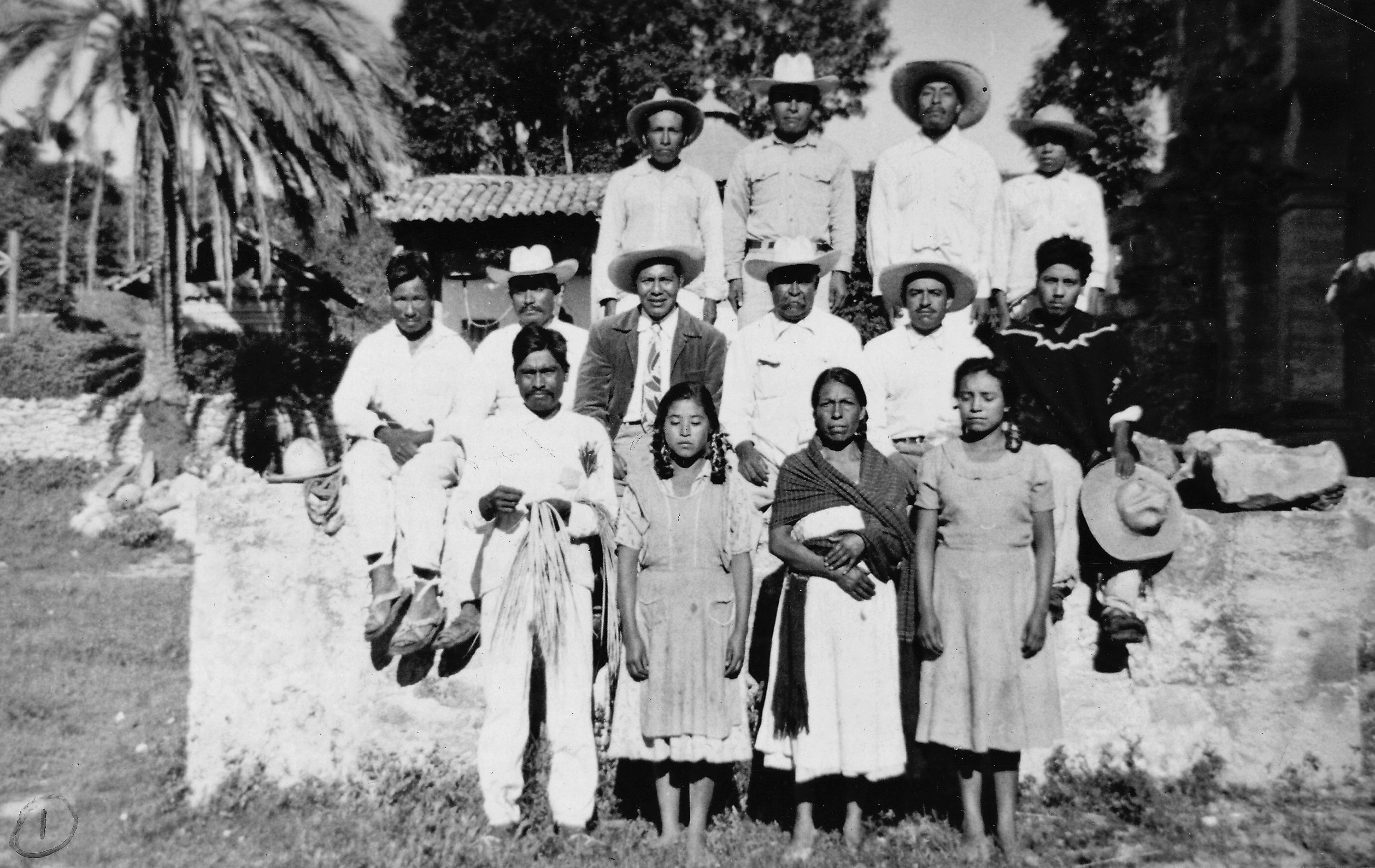 Achiutlences durante trazado del camino Ixtapa - Tlacotepec en 1952, Rutilio Ruiz Hernández de bigote entrecano, Raúl Ruiz Bautista usando corbata.